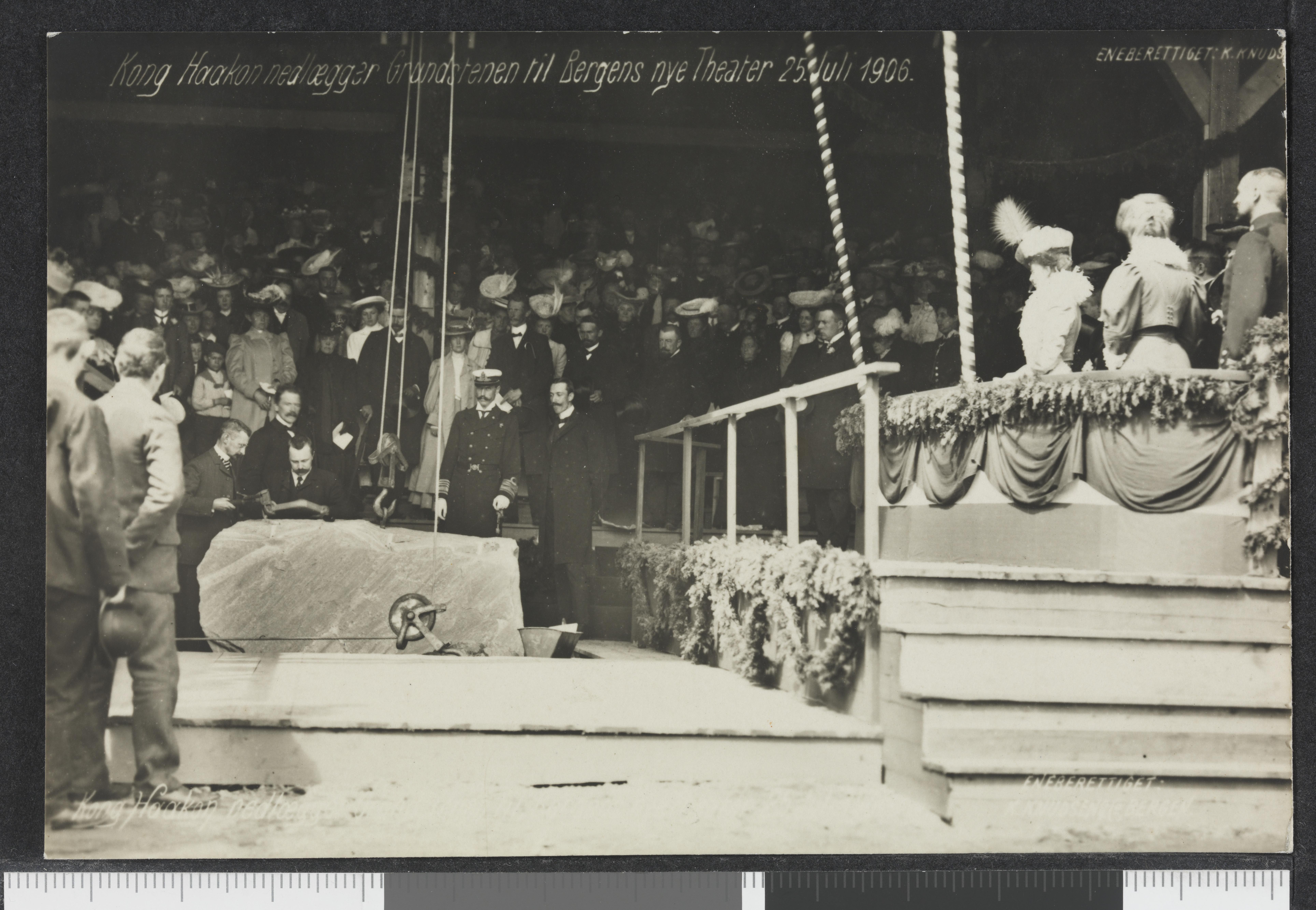 Bildet er hentet fra Nasjonalbibliotekets bildesamling Bergen, Hordaland Depicted person: Haakon VII konge av Norge Depicted person: Maud dronning av Norge